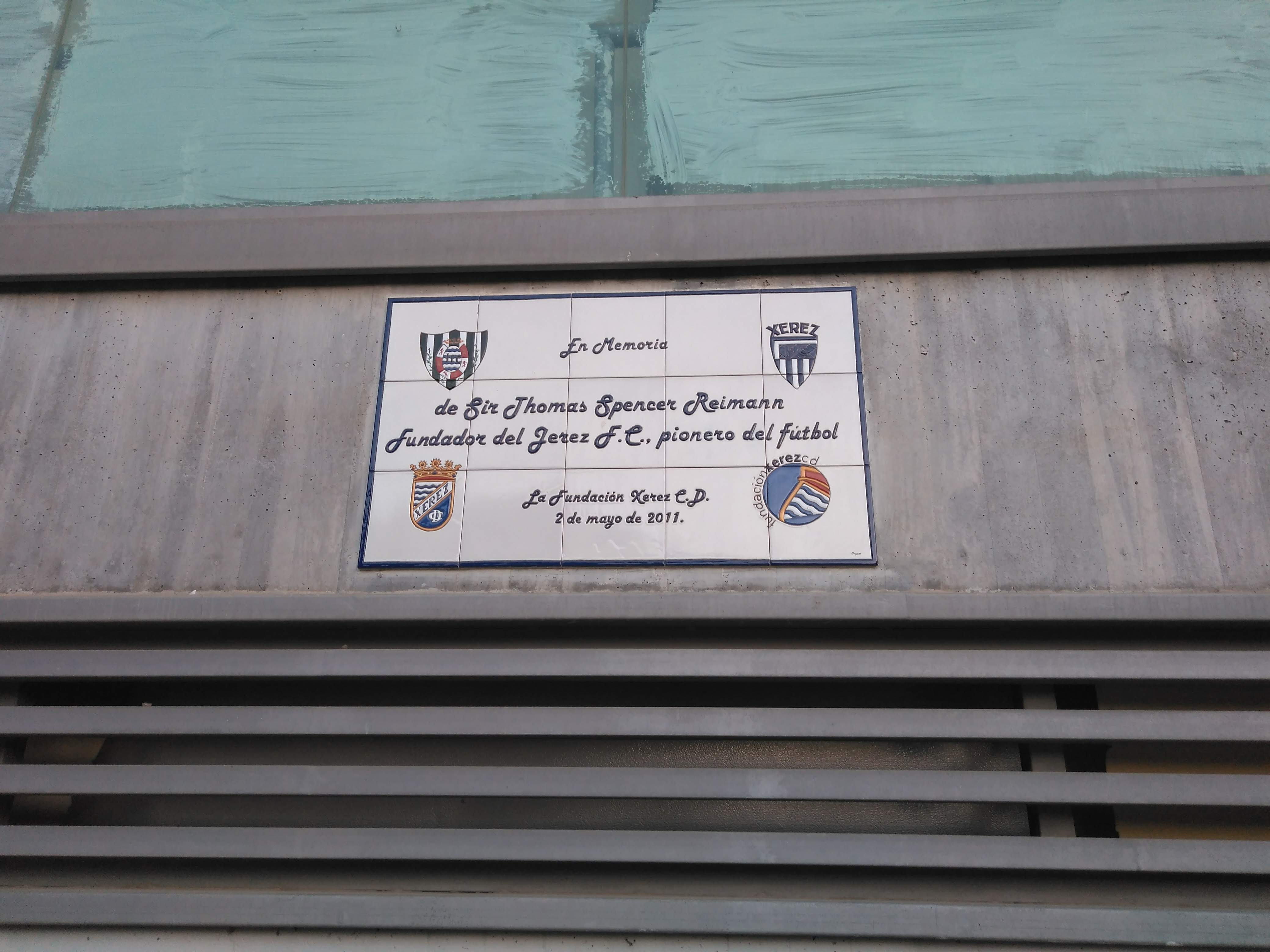 Placa en honor de Sir Arthur Spencer Reinmann, fundador del Jerez F.C., en el Estadio de Chapín (Jerez de la Frontera, España)